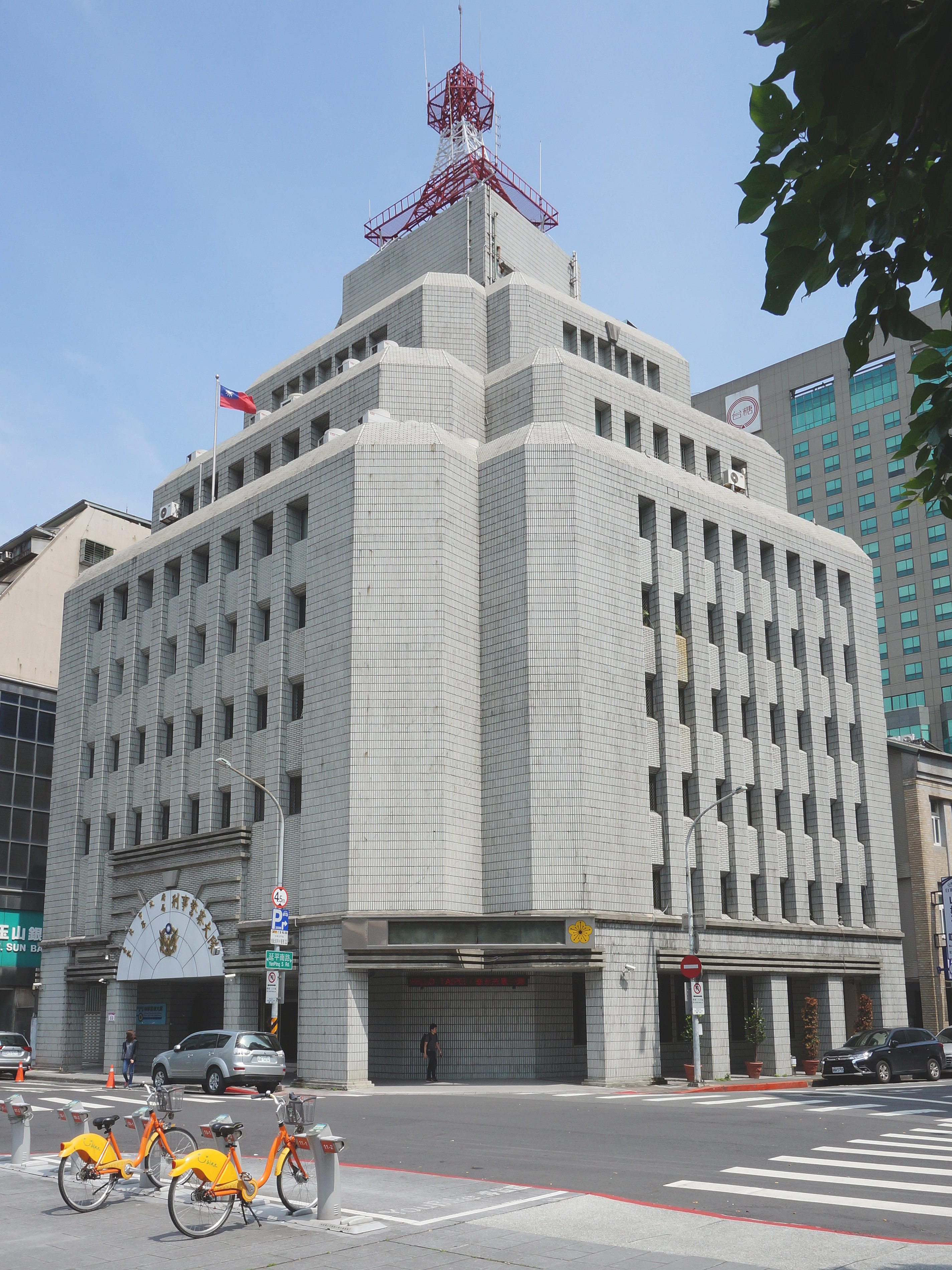 臺北市政府警察局刑事警察大隊辦公大樓，地址：臺北市中正區武昌街一段69號。